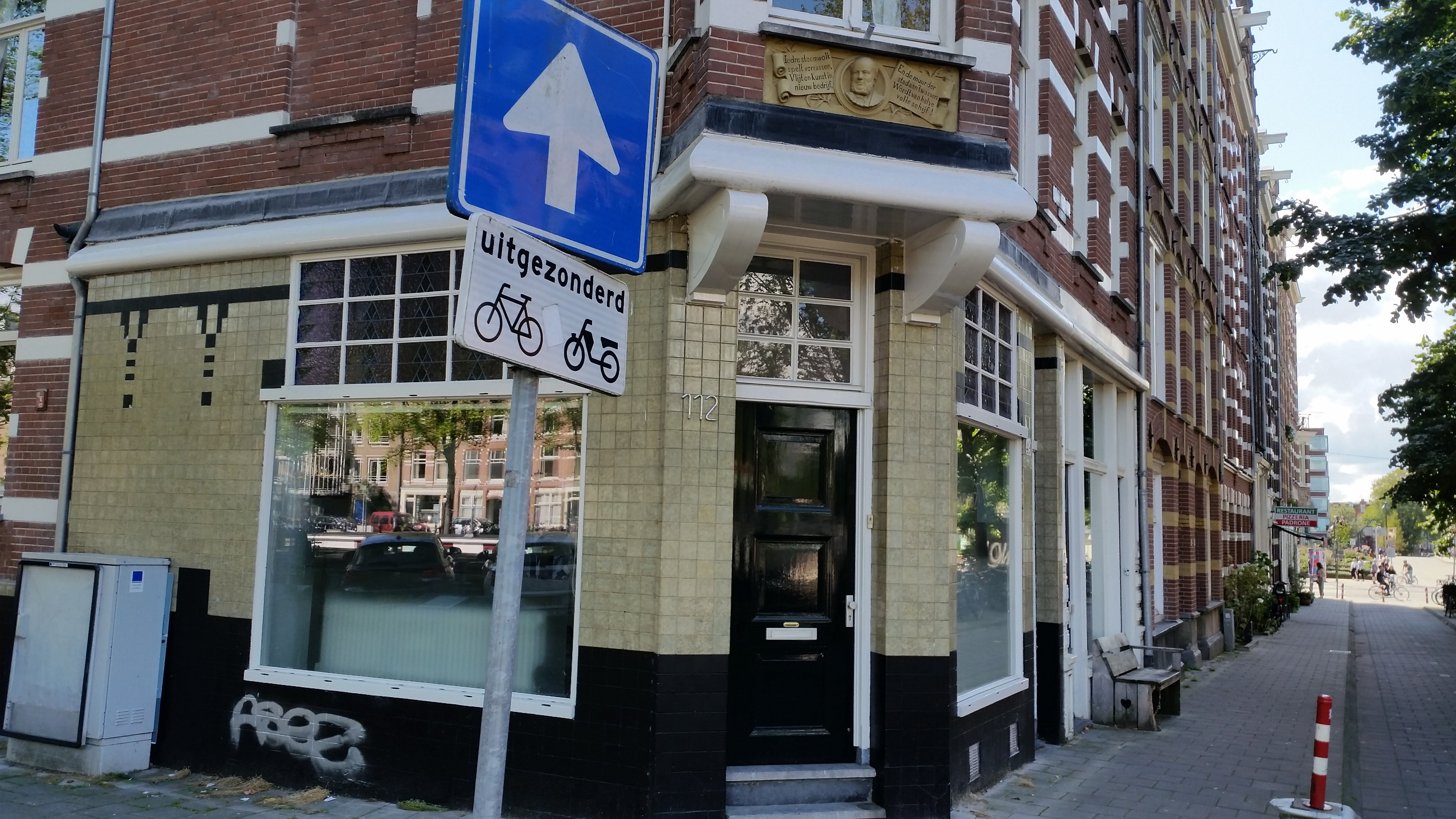 Tegelwerk en plaquette op Potgieterstraat 49, Amsterdam